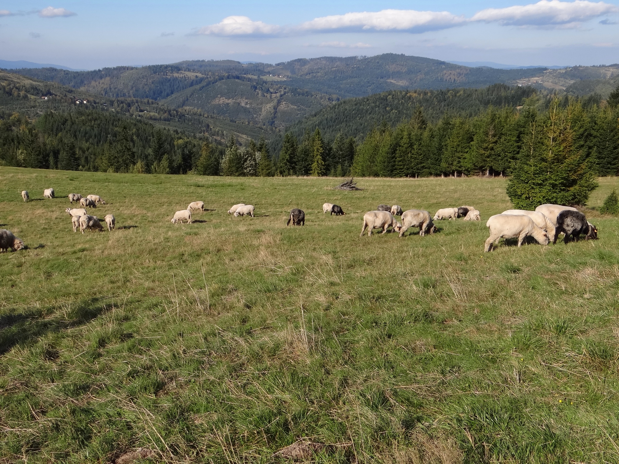 Hala Cukiernicza Niżna i widok na dolinę Żabniczanki i Abrahamów